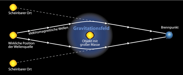 Gravitationslinse